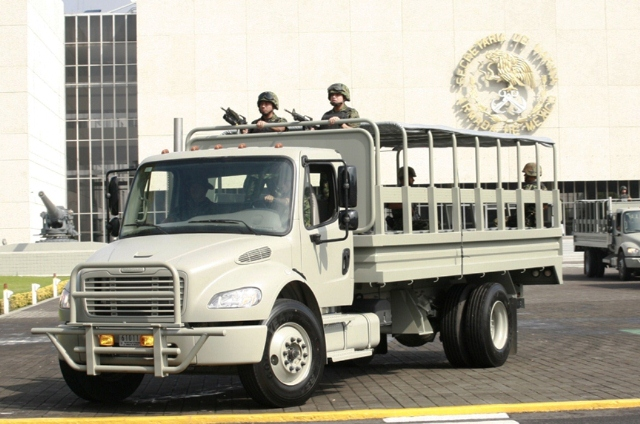 transporte de tropas